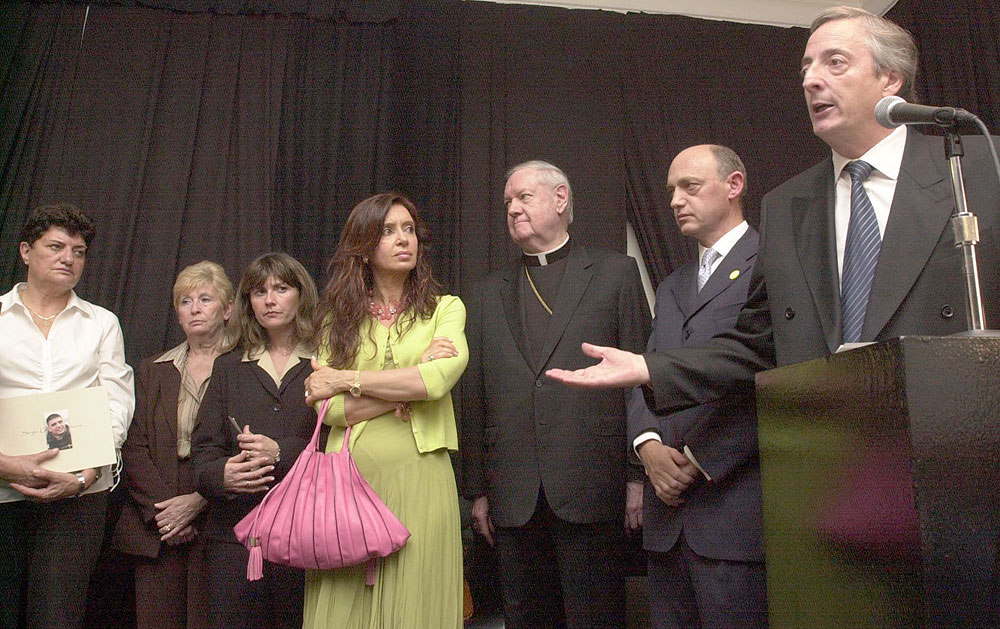 Víctimas argentinas del 11-S. El Presidente Kirchner junto a familiares en el consuilado argentino en Nueva Yrork. 22 SEP 2004. En la foto, de derecha a izquierda: Presidente Kirchner, Héctor Timerman (consul argentino en NY), Edward Egan (arzobispo de Nueva York), Cristina Kirchner (primera dama), familiares Gabriela Waisman, Pedro Grehanm, Mario Santoro y Sergio Villanueva.